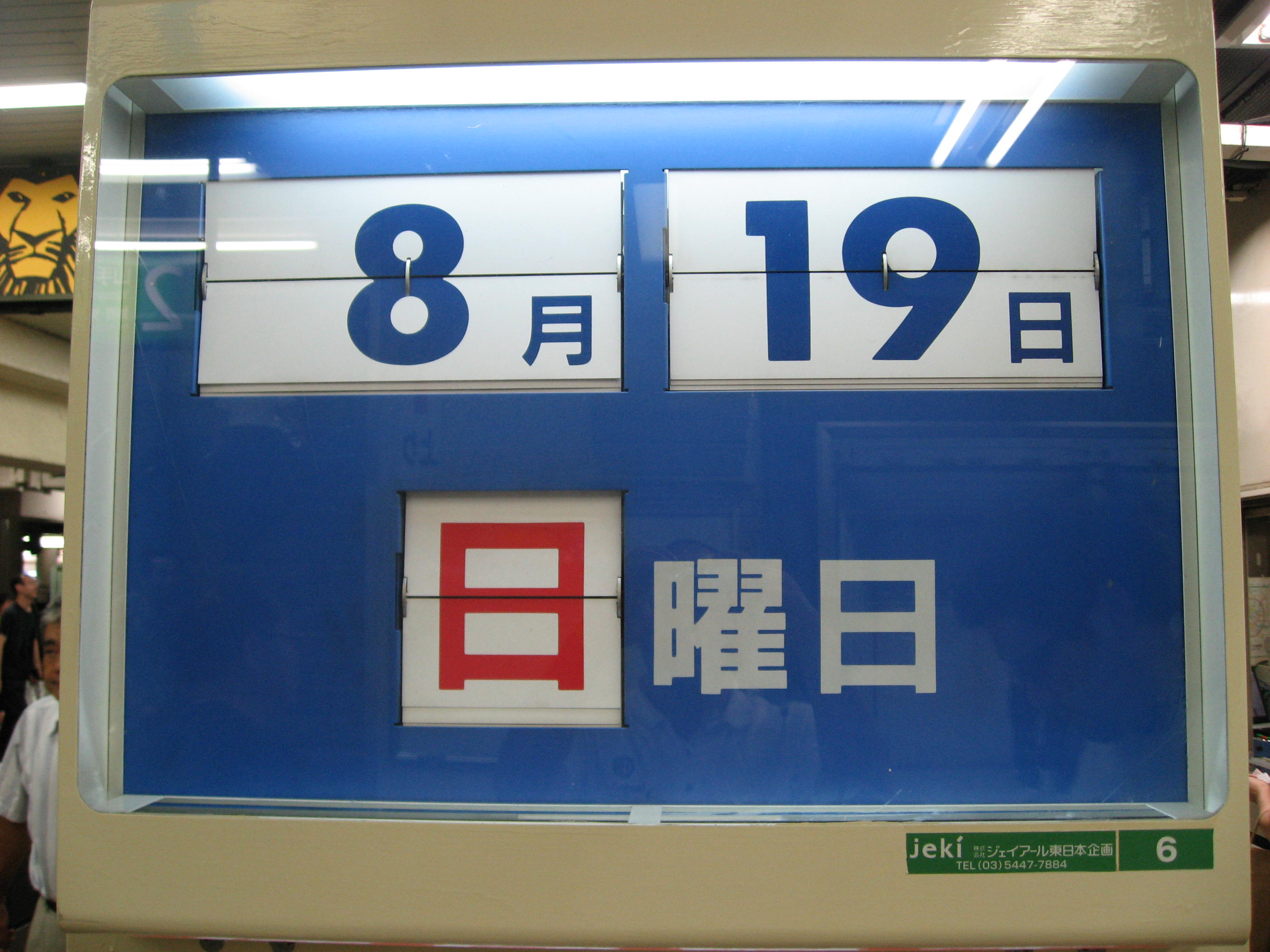 calendar